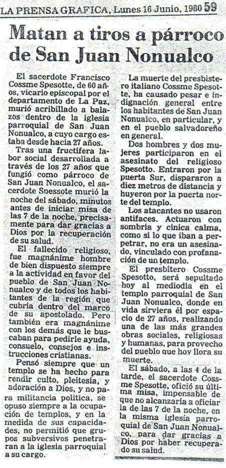 Matan a Fray Cosme Parroco San Juan Nonualco Titular de la Prensa Grafica